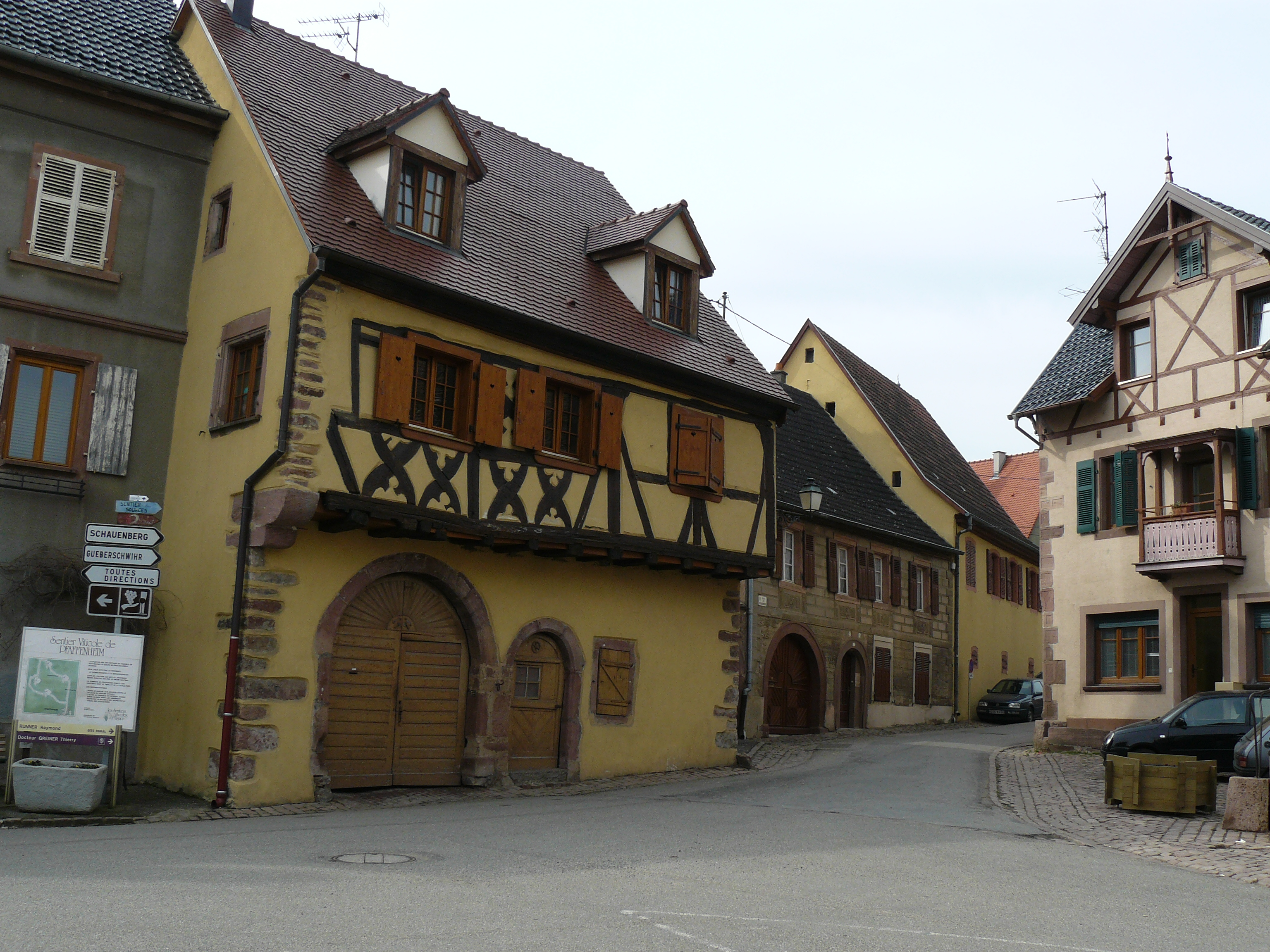 Maisons à colombages, place de la Mairie